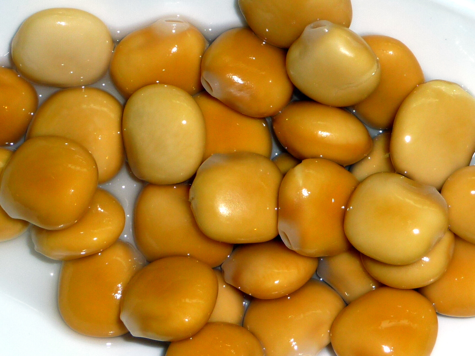 Lupinus albus (altramuces o chochitos)